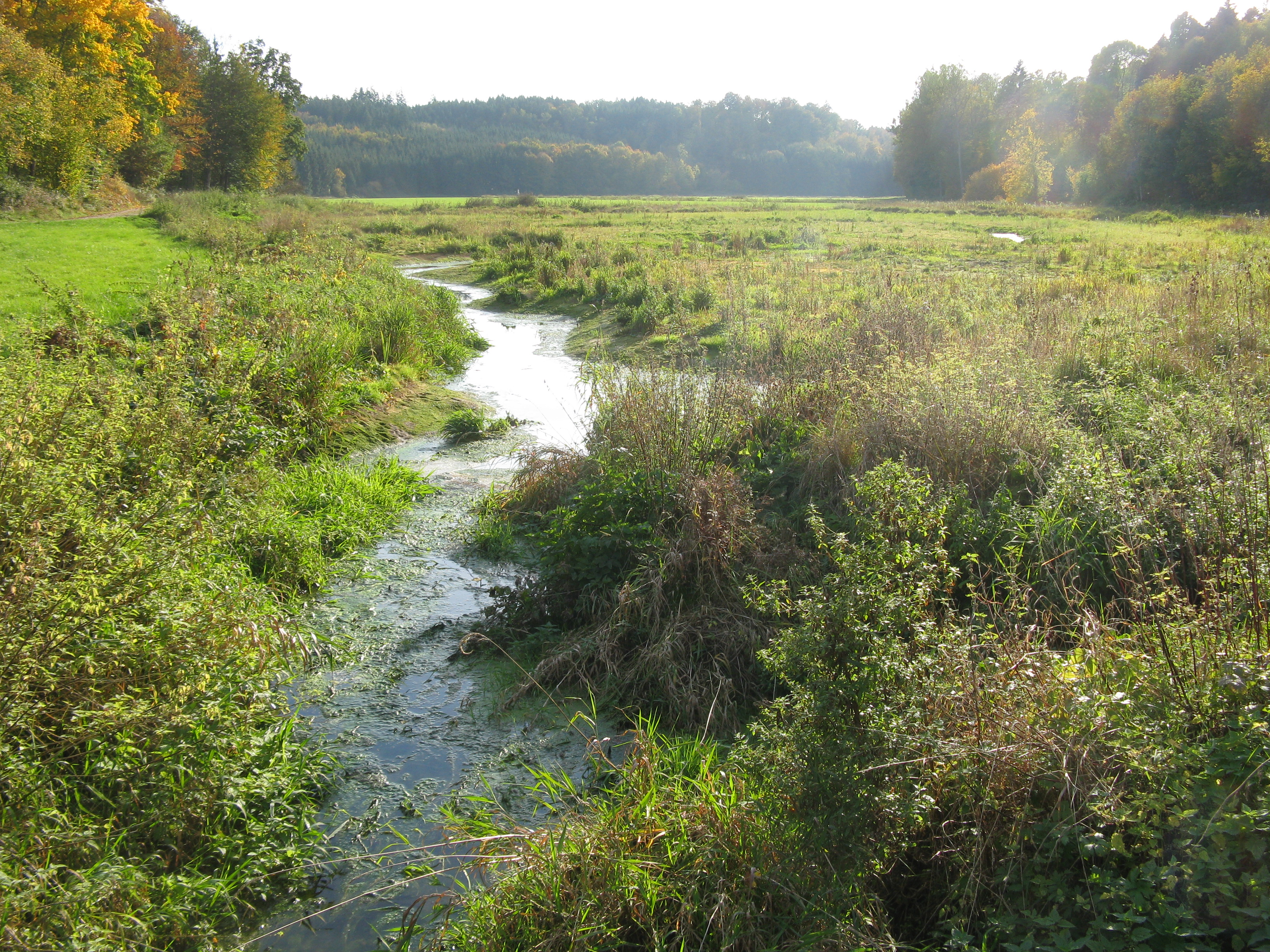 Die Lone bei Stetten im Oktober; Landschaftsschutzgebiet „Lone- und Hürbetal“